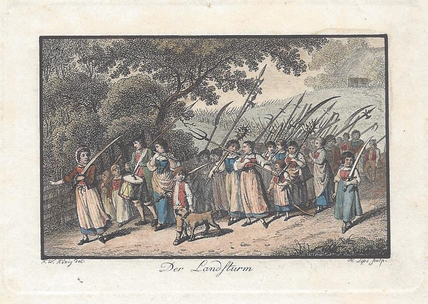 Der Landsturm. Kolorierter Kupferstich von Johann Heinrich Lips nach Franz Niklaus König